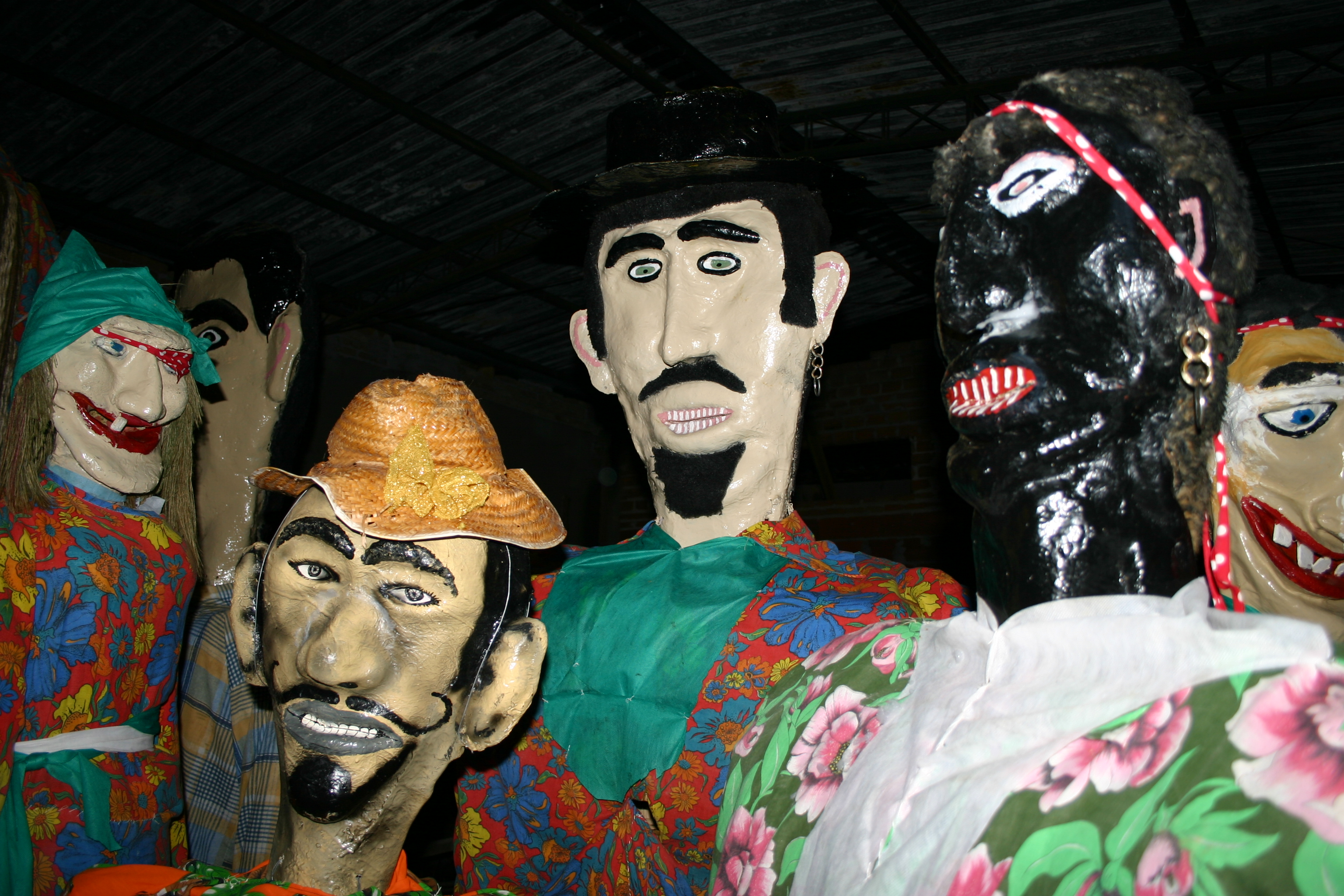 Pereirões de Monteiro Lobato. Cabeça de empapelamento e corpo de cesto de taquara vestido em chita.